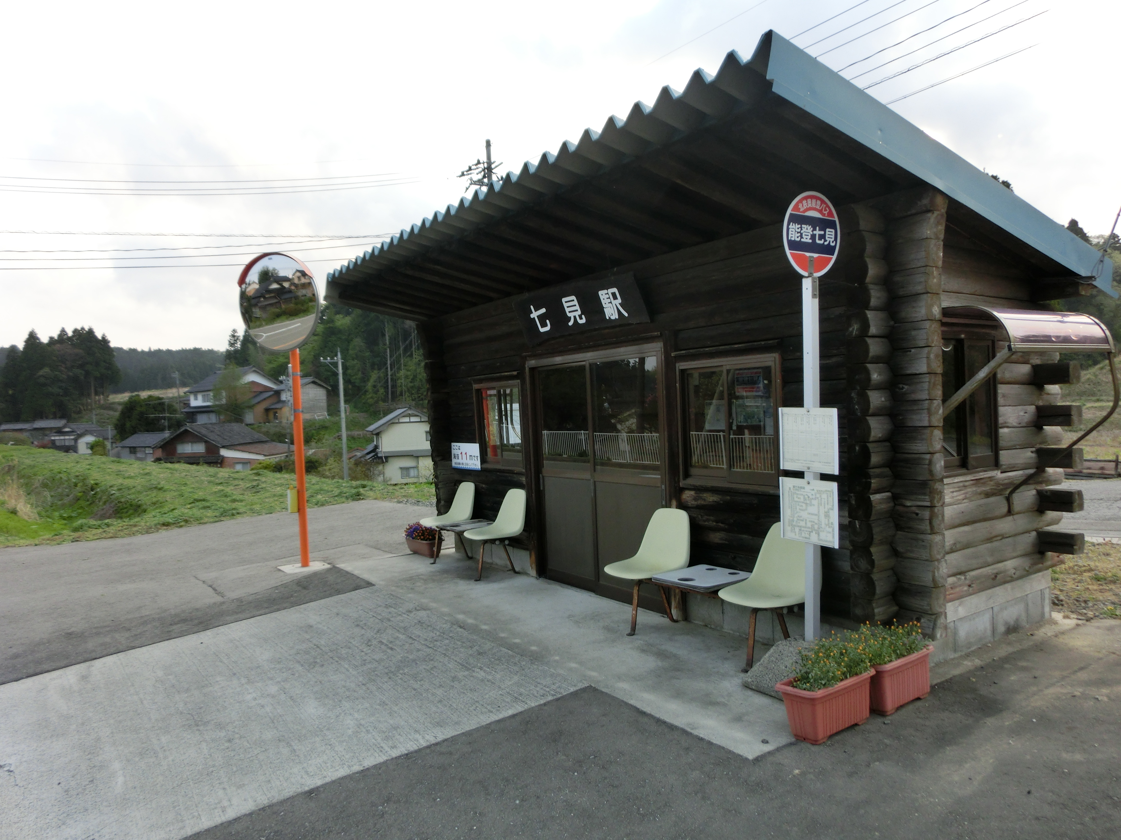 移設され、バスの待合室となった七見駅待合室。 左奥後方の土手にホームがあった。